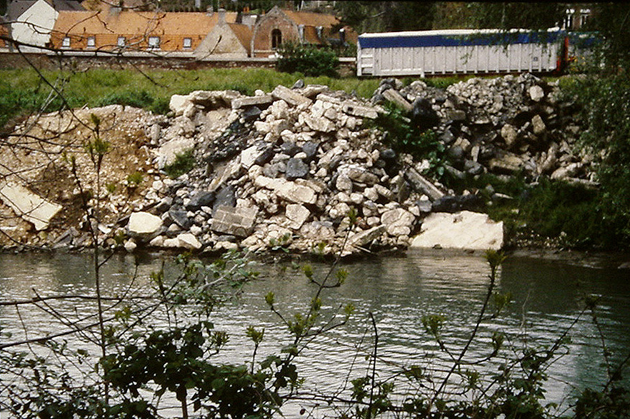 A l'après guerre, puis dans les années 1960 à 1990, l'urbanisation, le drainage et/ou comblement des zones humides et le labour ont accentué la brutalité et la violence des inondations de l'Aa, qui ont dégradé les berges, lesquelles ont souvent été restaurées à l'aide de déchets industriels, agricoles et gravats divers (ici en aval du marais de Lumbres).